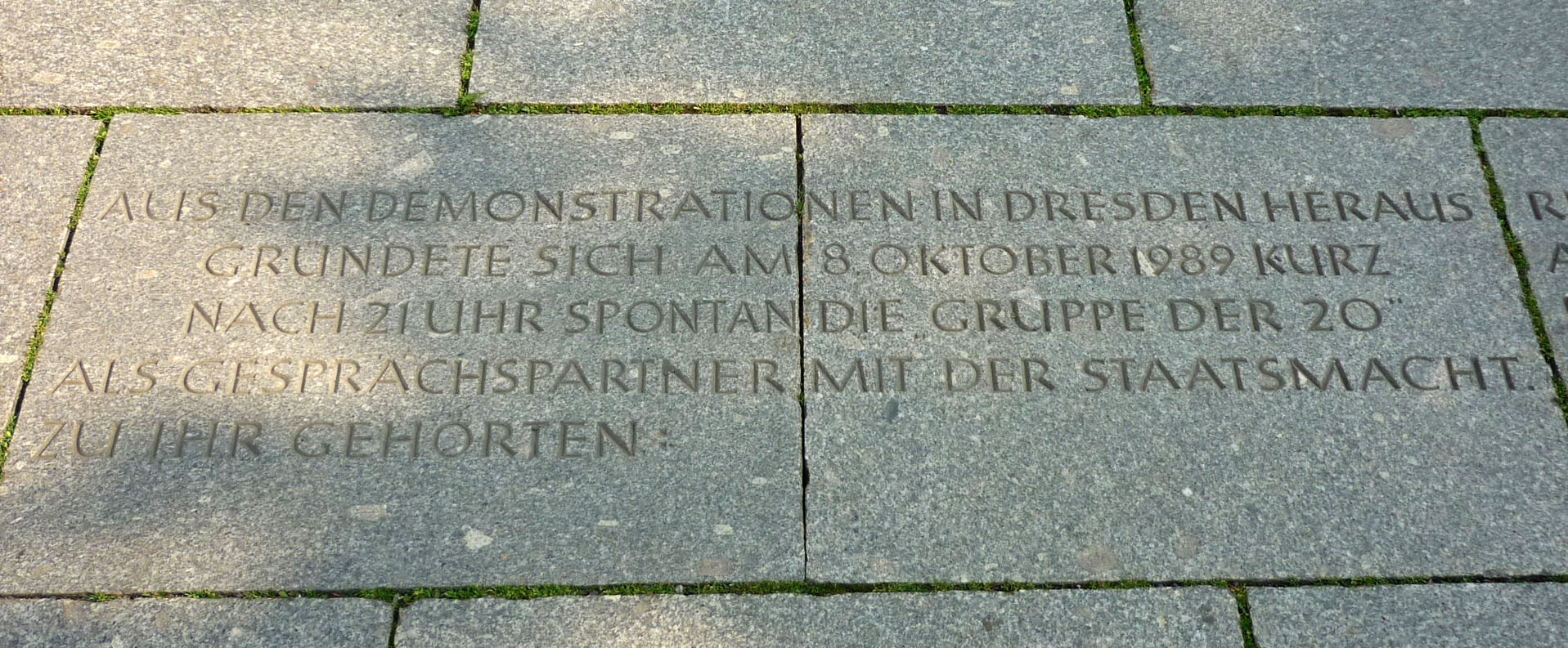 Gedenkstein zur Erinnerung an den 8. Oktober 1989 auf der Prager Straße mit folgendem Text: Aus den Demonstrationen in Dresden heraus gründete sich am 8. Oktober 1989 kurz nach 21 Uhr spontan die "Gruppe der 20" als Gesprächspartner mit der Staatsmacht.